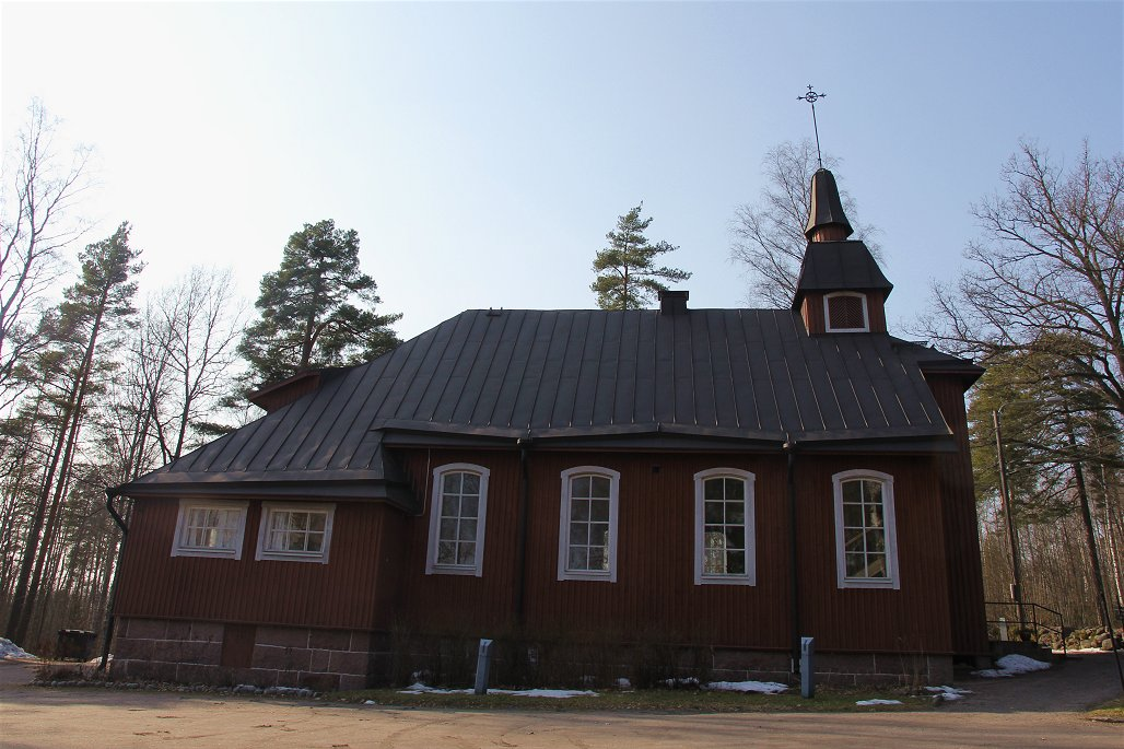 Seutulan kappeli on Vantaan kaupungin Seutulan kaupunginosassa sijaitseva, vuonna 1925 rakennettu puukirkko. Kirkon omistus siirtyi paikalliselta rukoushuoneyhdistykseltä seurakunnalle vuonna 1964. Seuraavana vuonna 2.5.1965 piispa Aarre Lauha vihki kappelin.